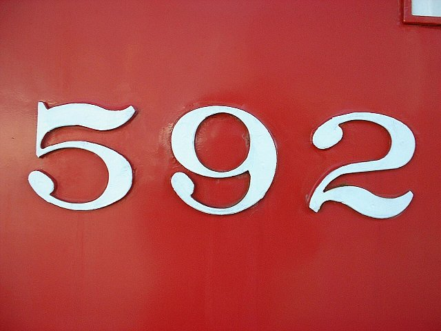 名古屋鉄道車輌の車輌番号書体（名鉄モ590形電車 車体側面） 現在は廃車ののち土佐電気鉄道へ譲渡され、同社590形となっている